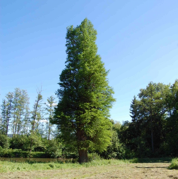 Památný tisovec dvouřadý v Dolní Lukavici (v létě)